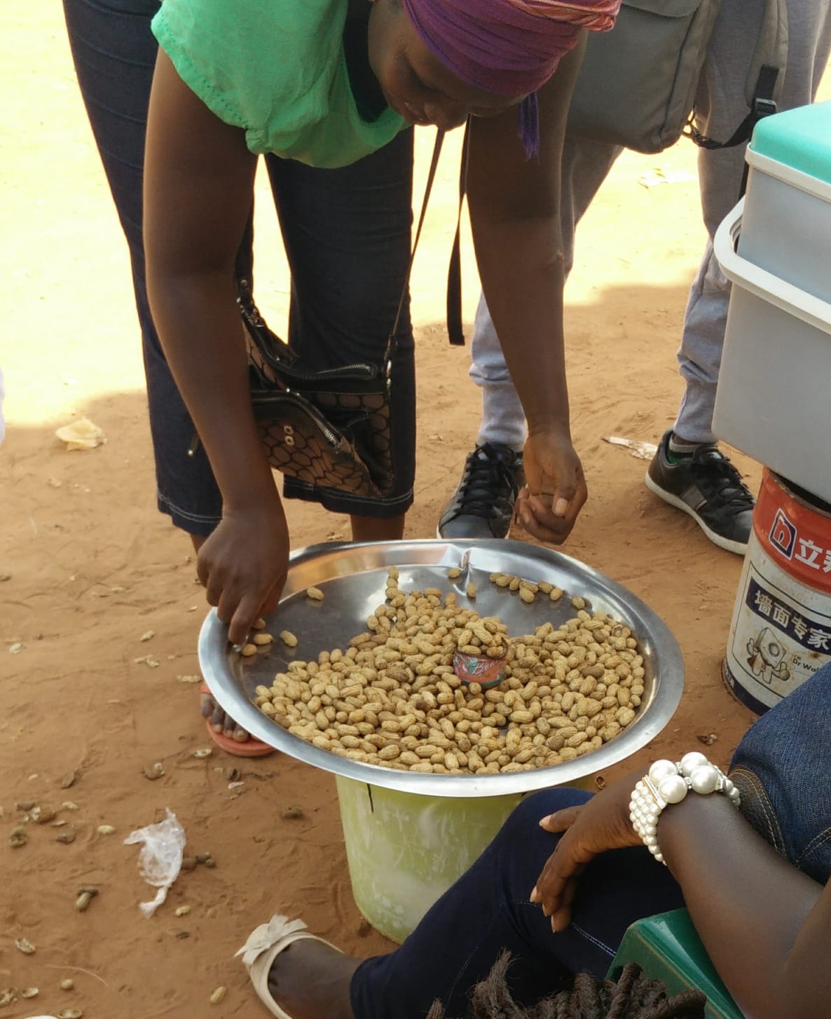 Vendedora de rua de Mancarra a medir a quantidade para venda.